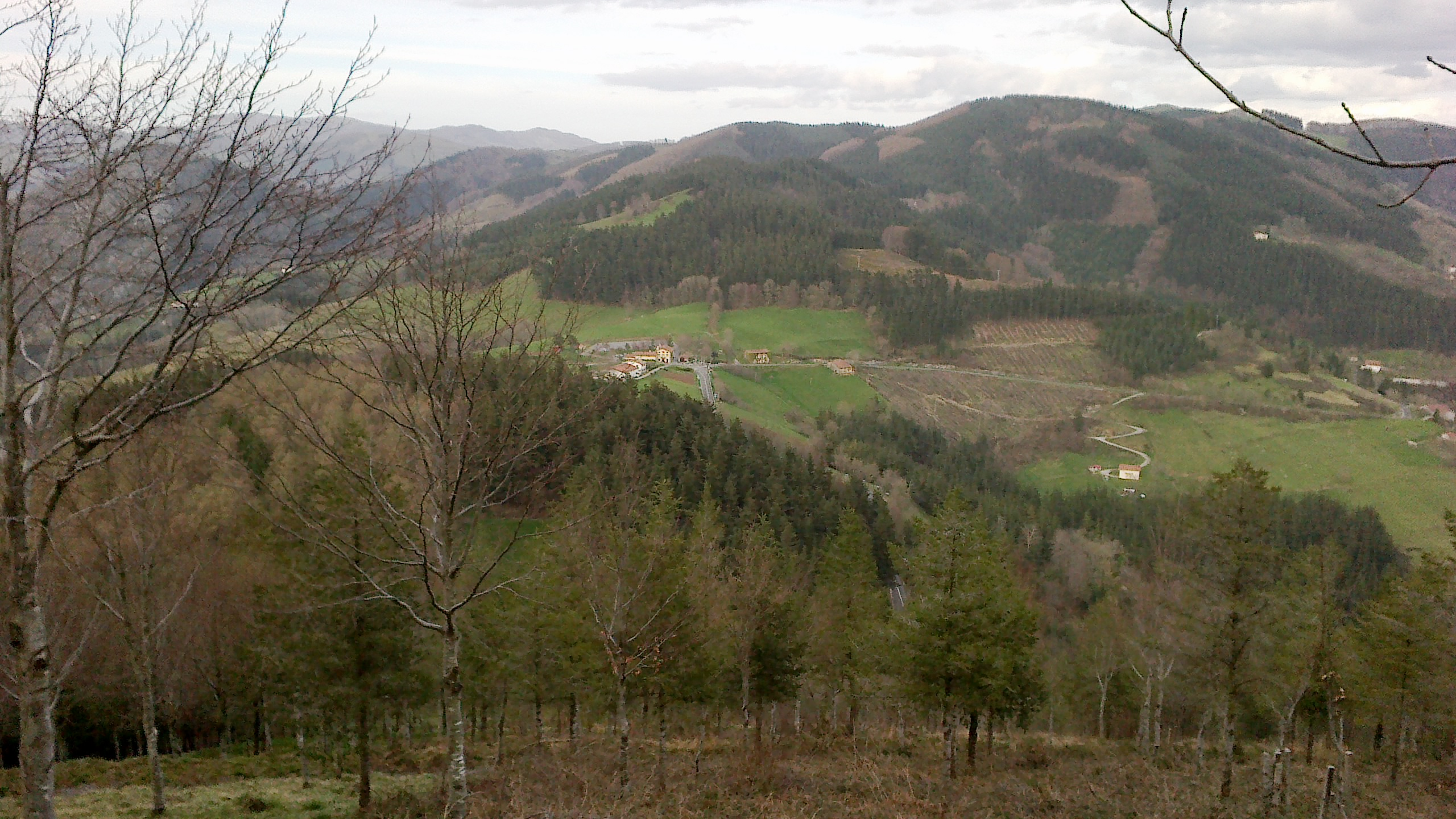 Mandubia (Ezkio-Itsaso, Gipuzkoa), Kizkitza mendiaren tontorretik